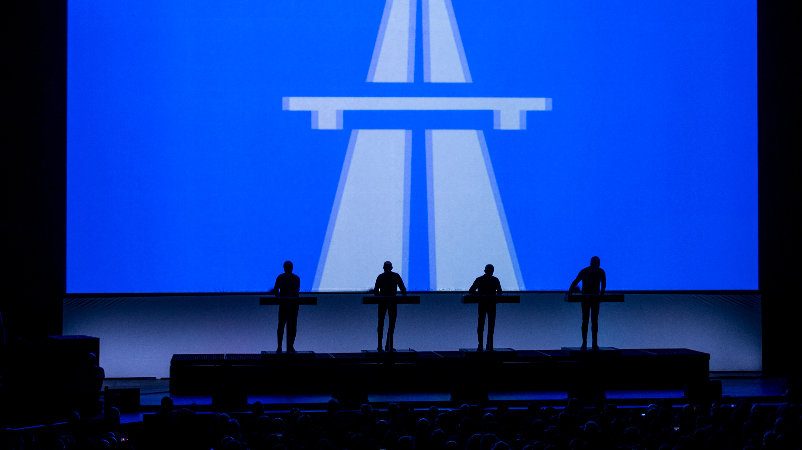 KraftwerkRAH210617-12